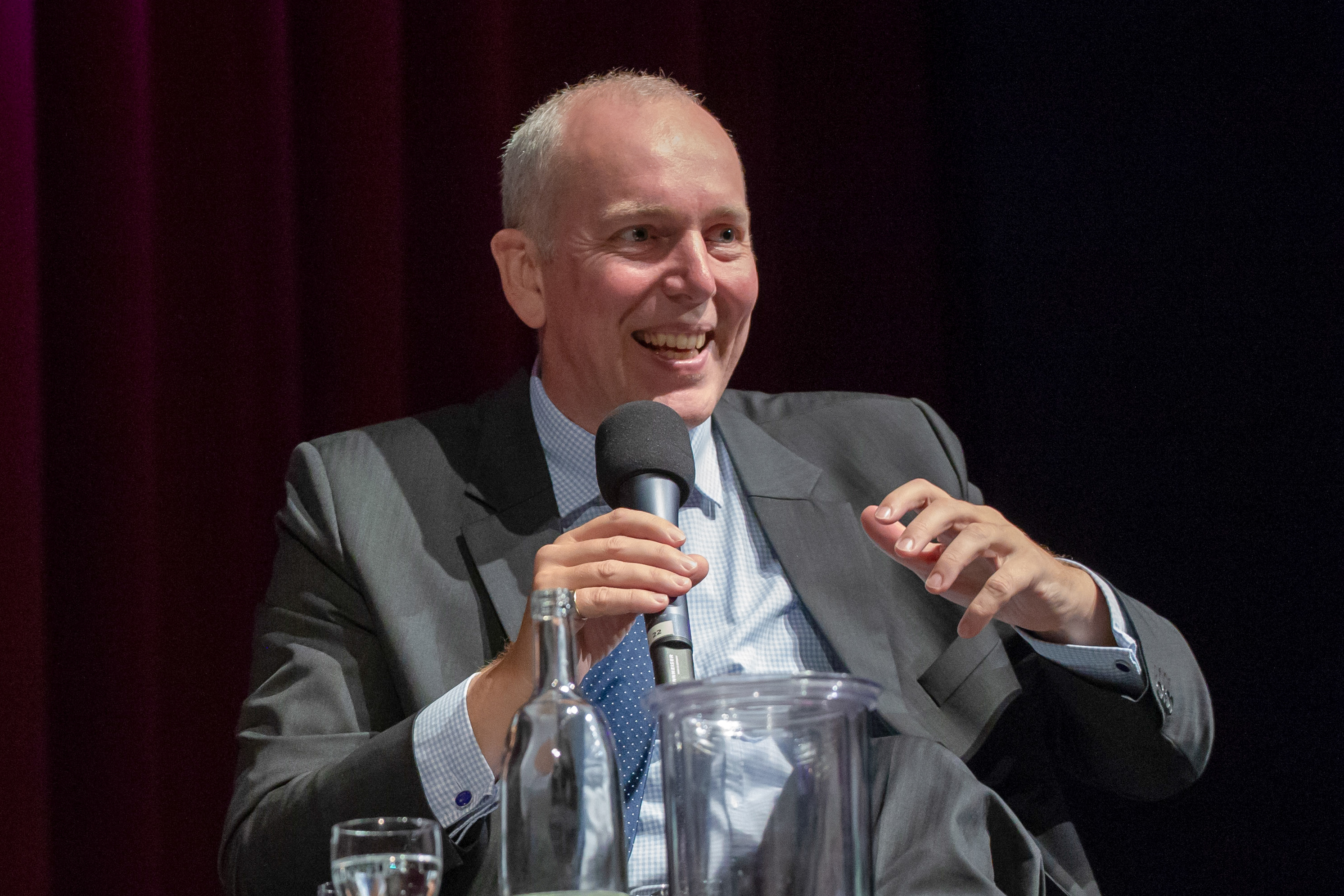 Bürgerdialog im Theater Erfurt zum Thema "10 Jahre nach der Lehman-Pleite. Wie gefährlich ist das Weltfinanzsystem heute?"